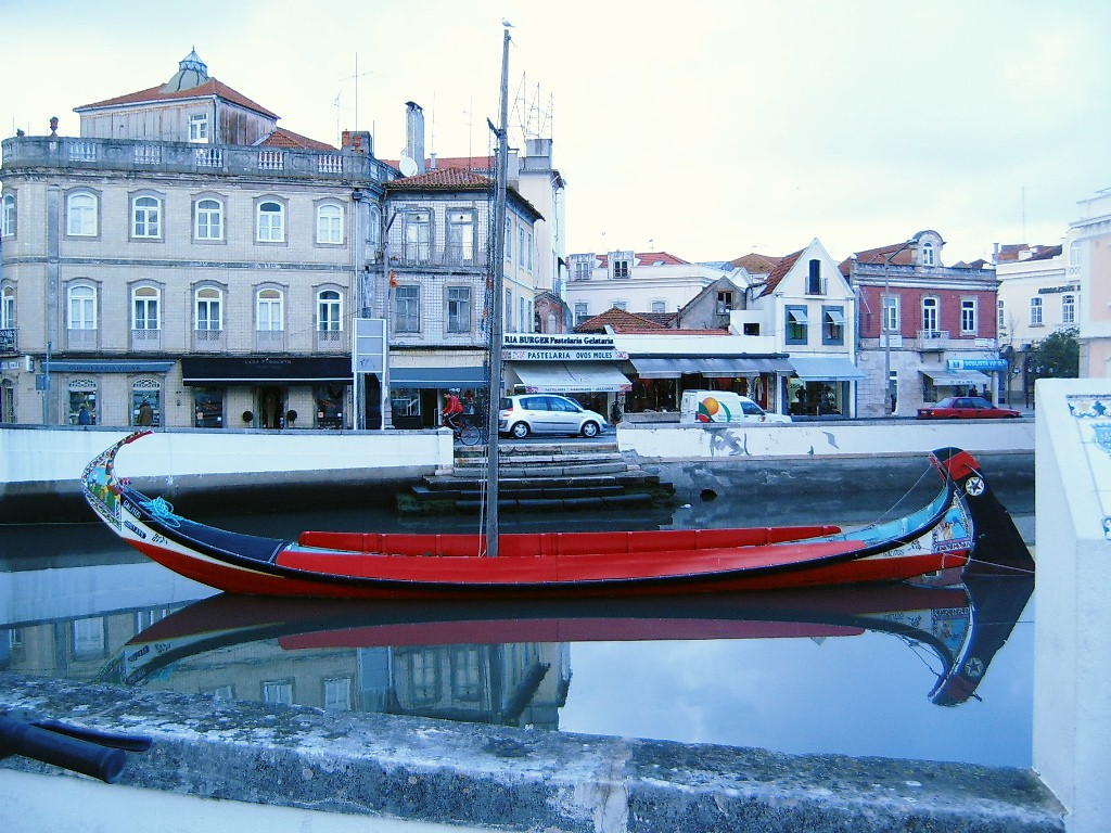 C Resende Moliceiro em Aveiro